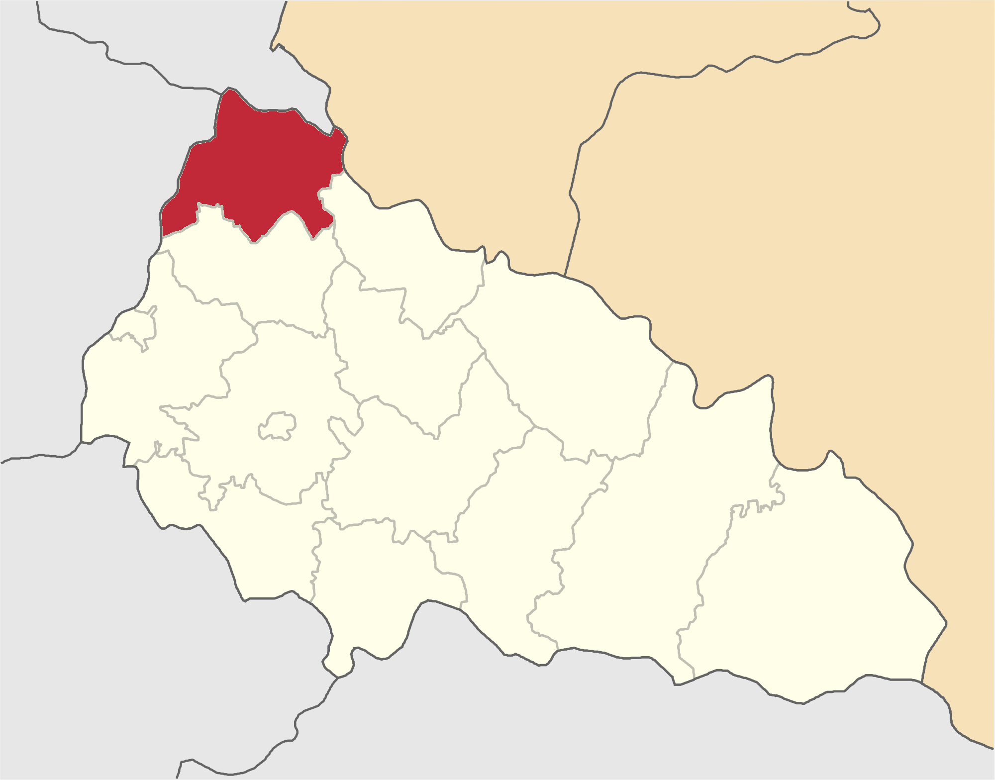 Velykobereznyanskyi-Raion map